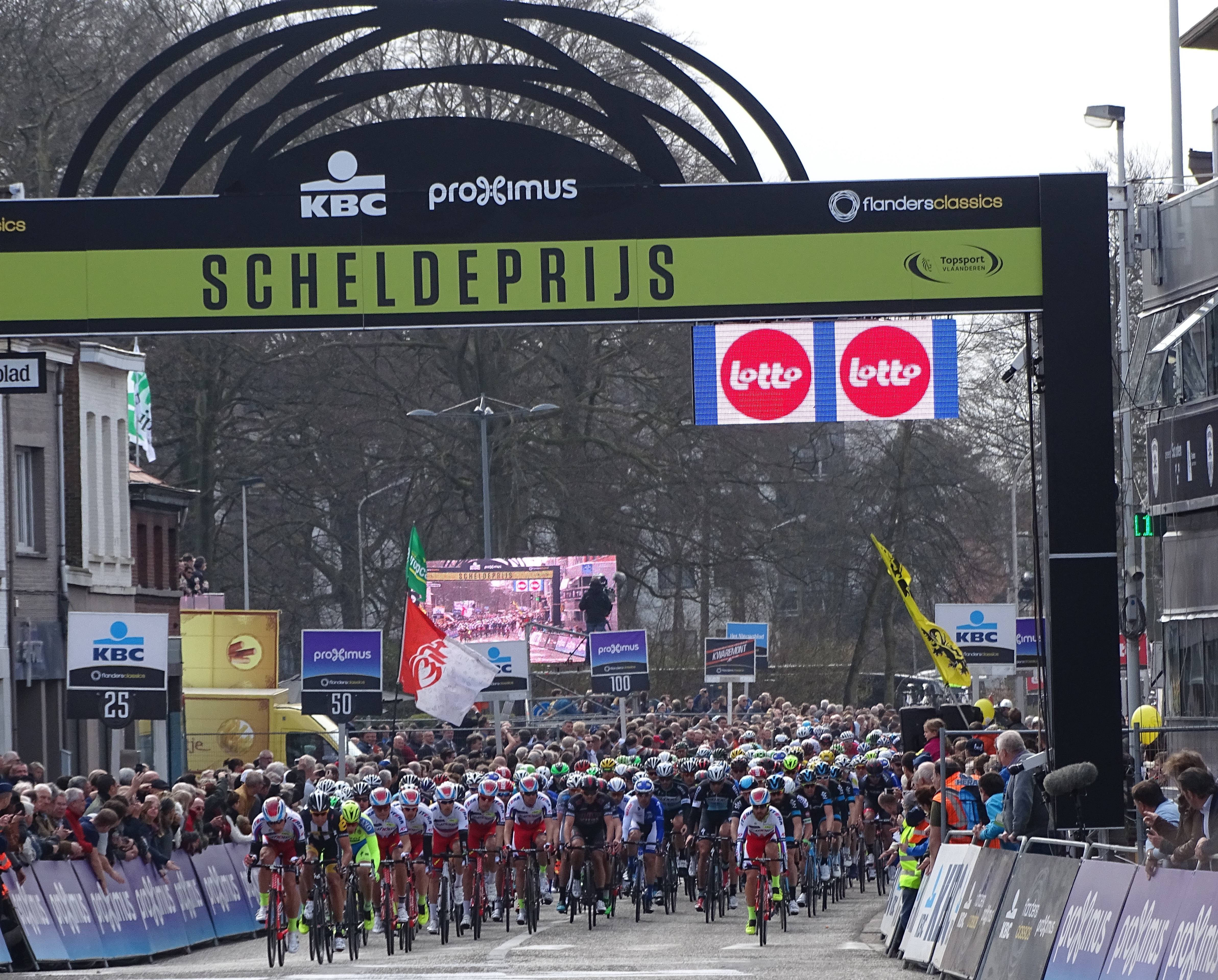 Reportage réalisé le mercredi 8 avril à l'occasion de l'arrivée du Grand Prix de l'Escaut 2015 à Schoten, Belgique.